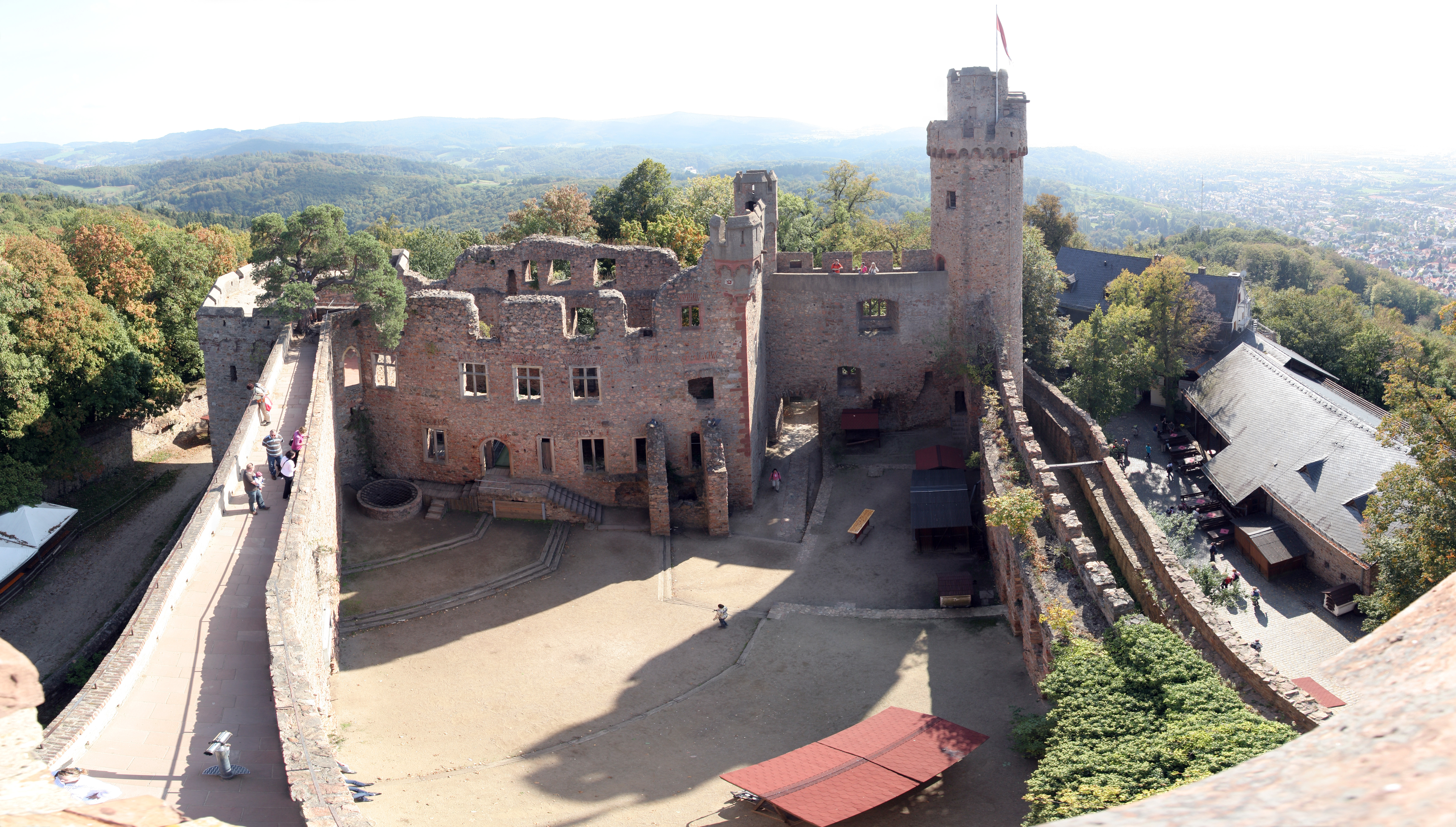 Das Auerbacher Schloss vom Nordturm aus fotografiert. Aus 12 Einzelaufnahmen mit Hugin zusammengesetzt.